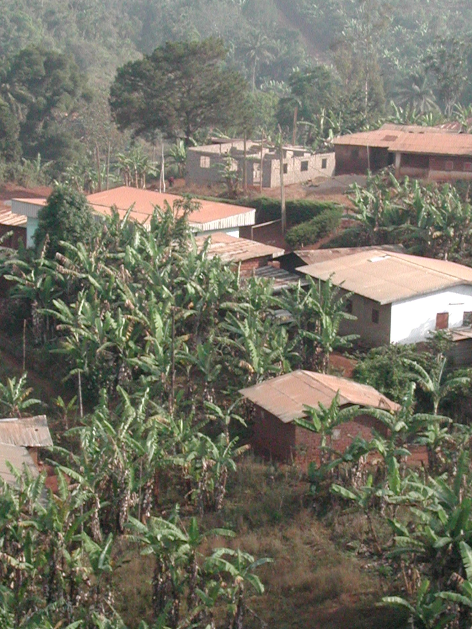 Vue de Bana au Cameroun